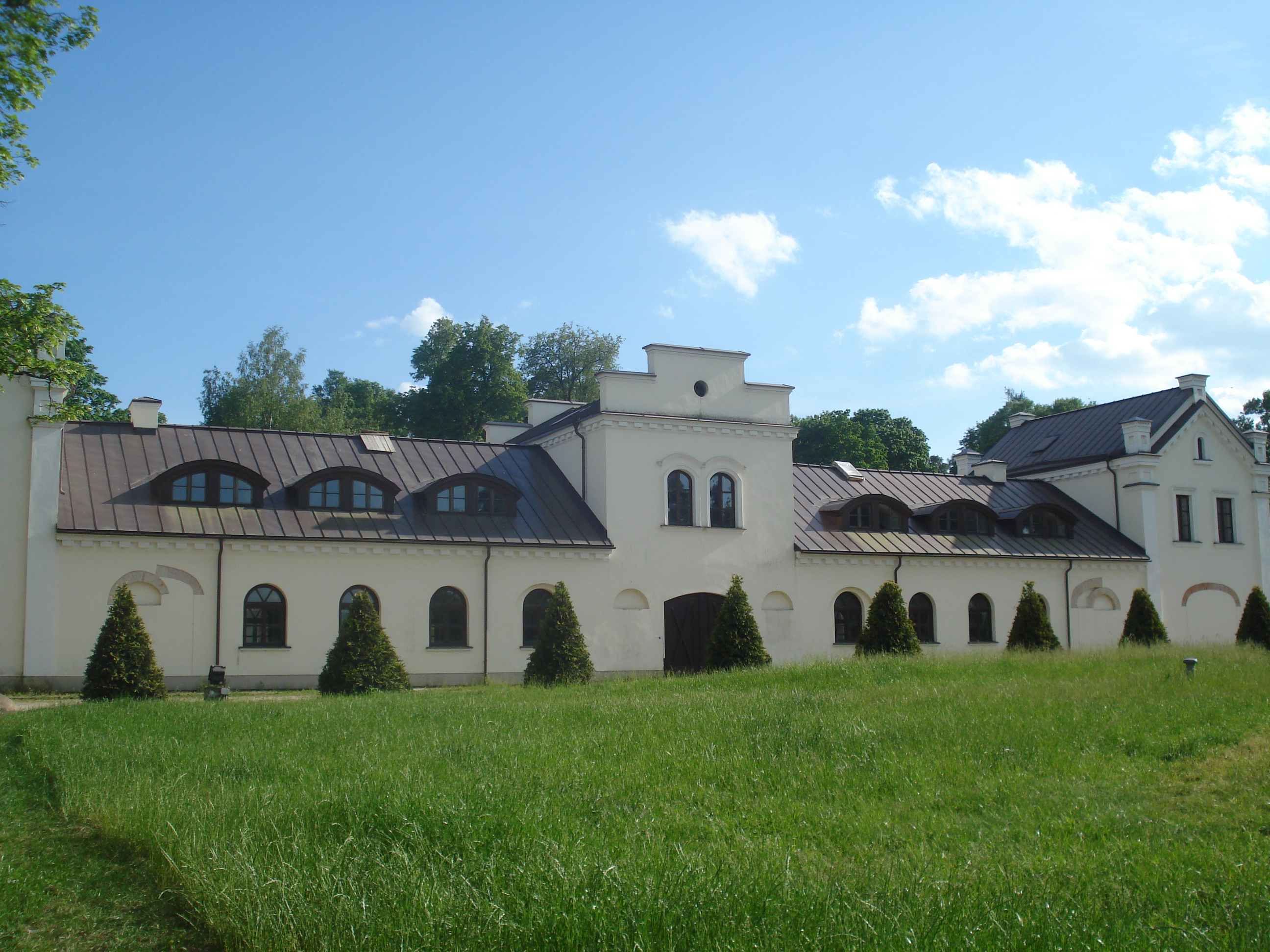 Stable in the former manor Kojrany. Restauruotas arklidžių pastatas Kairėnuose